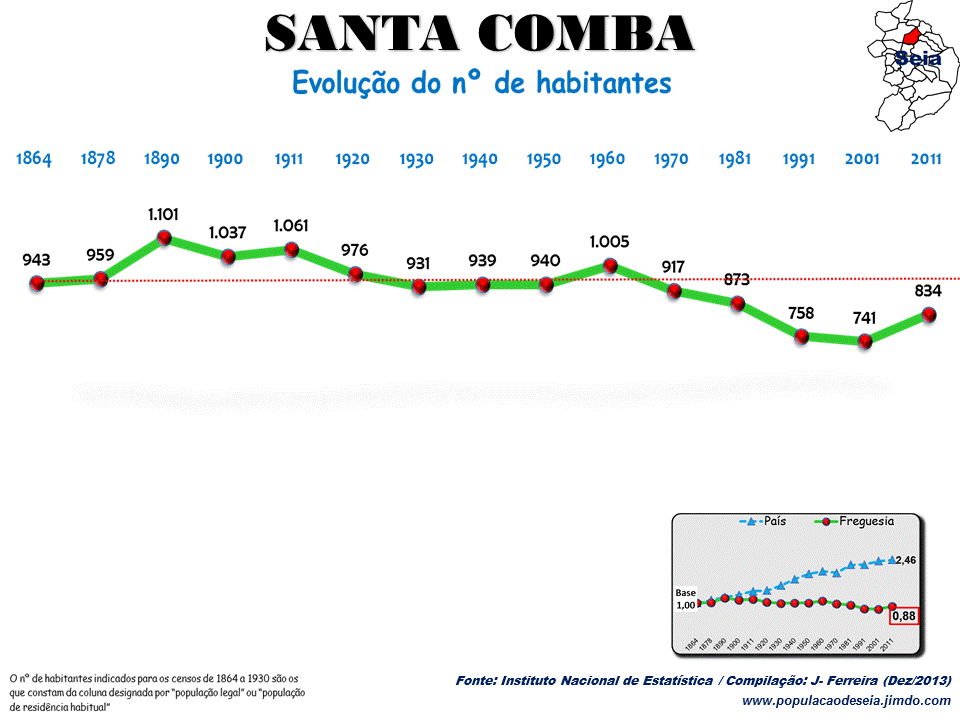 Evolução da População 1864 / 2011